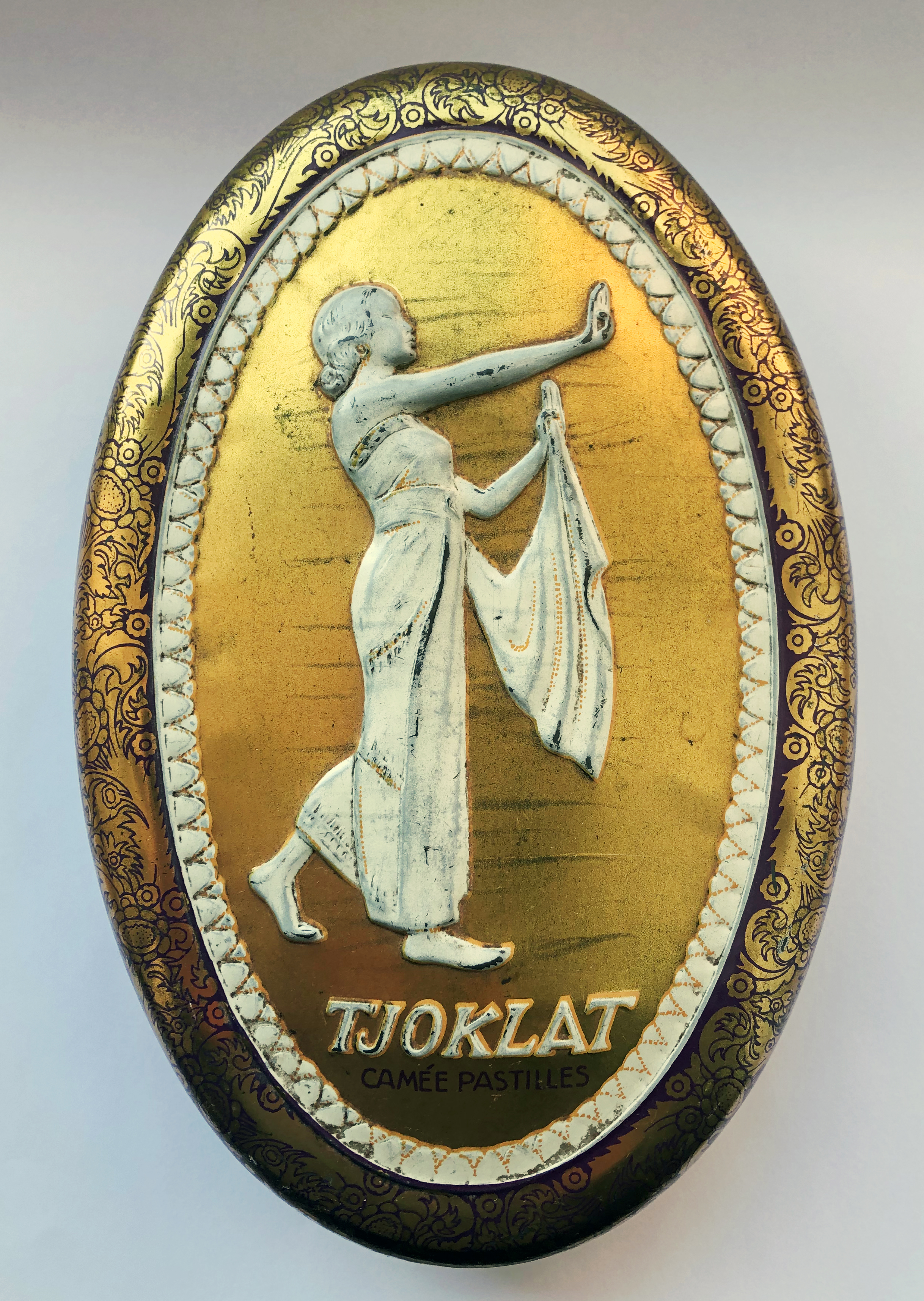 Tjoklat Camée Patilles - ovale Schokoladen Dose der Tjokolat-Fabriek N.V. Amsterdam, 18 x 12 cm, Höhe 3,5 cm